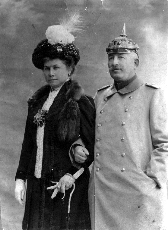 Georg von Rode (* 21. September 1857; † 6. Mai 1927) als General, mit seiner zweiten Ehefrau Anna von Rode geb. Krausgrill (* 1859; † 1931). Undatiert.